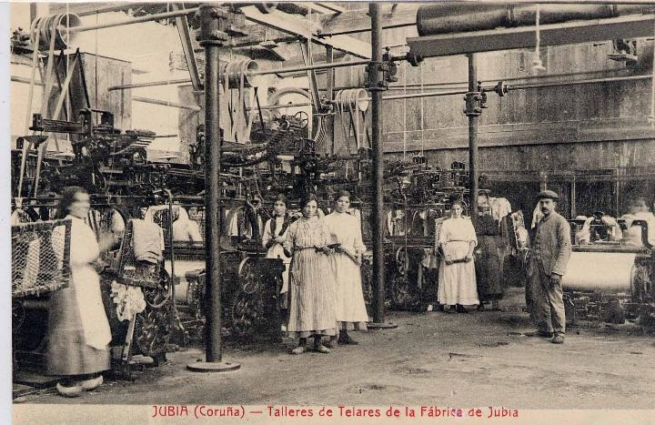 Jubia (Coruña) - Talleres de Telares de la Fábrica de Jubia